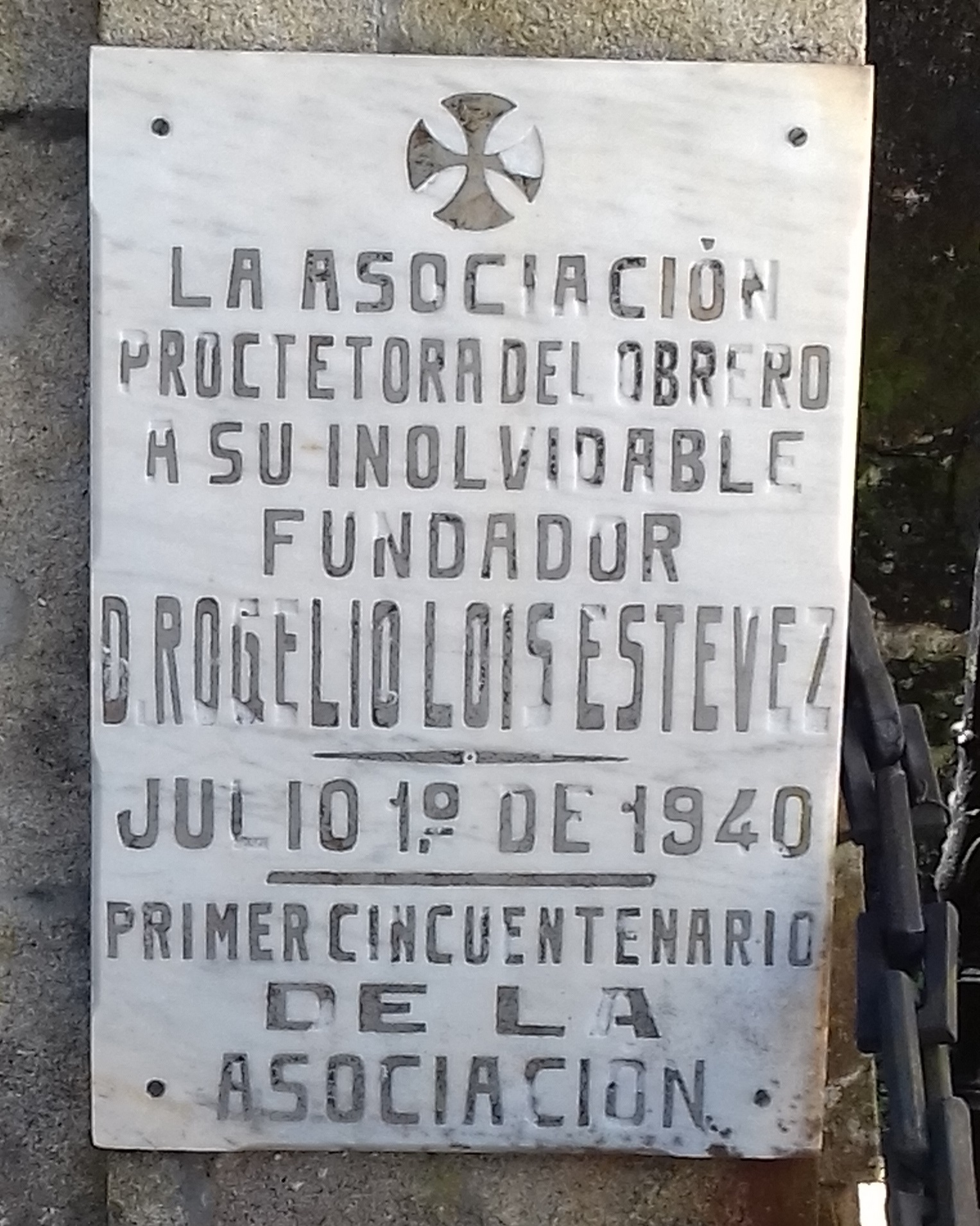 Lápida en homenaxe a Roxelio Lois Estévez